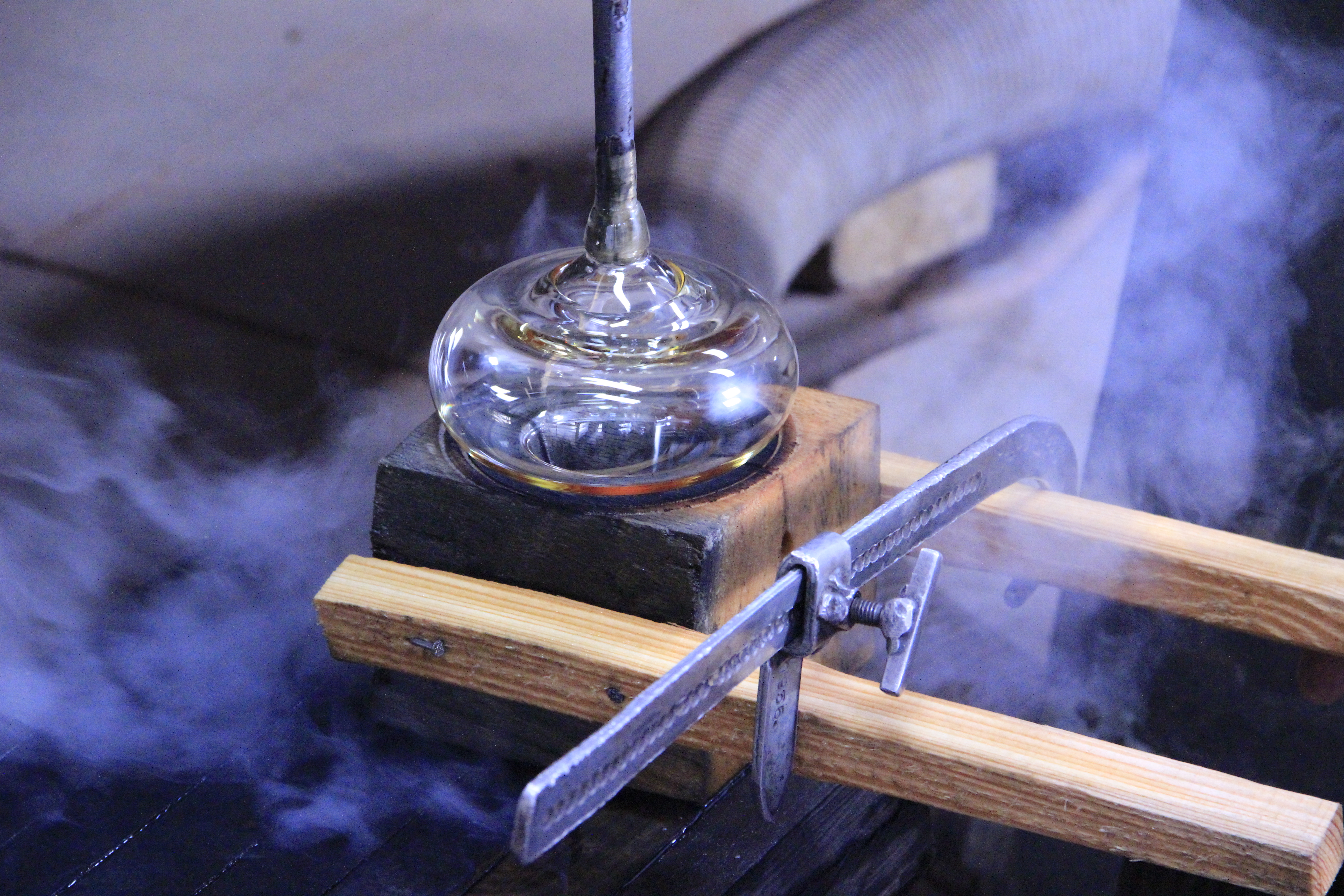 Piechowice, Huta Julia - produkcja